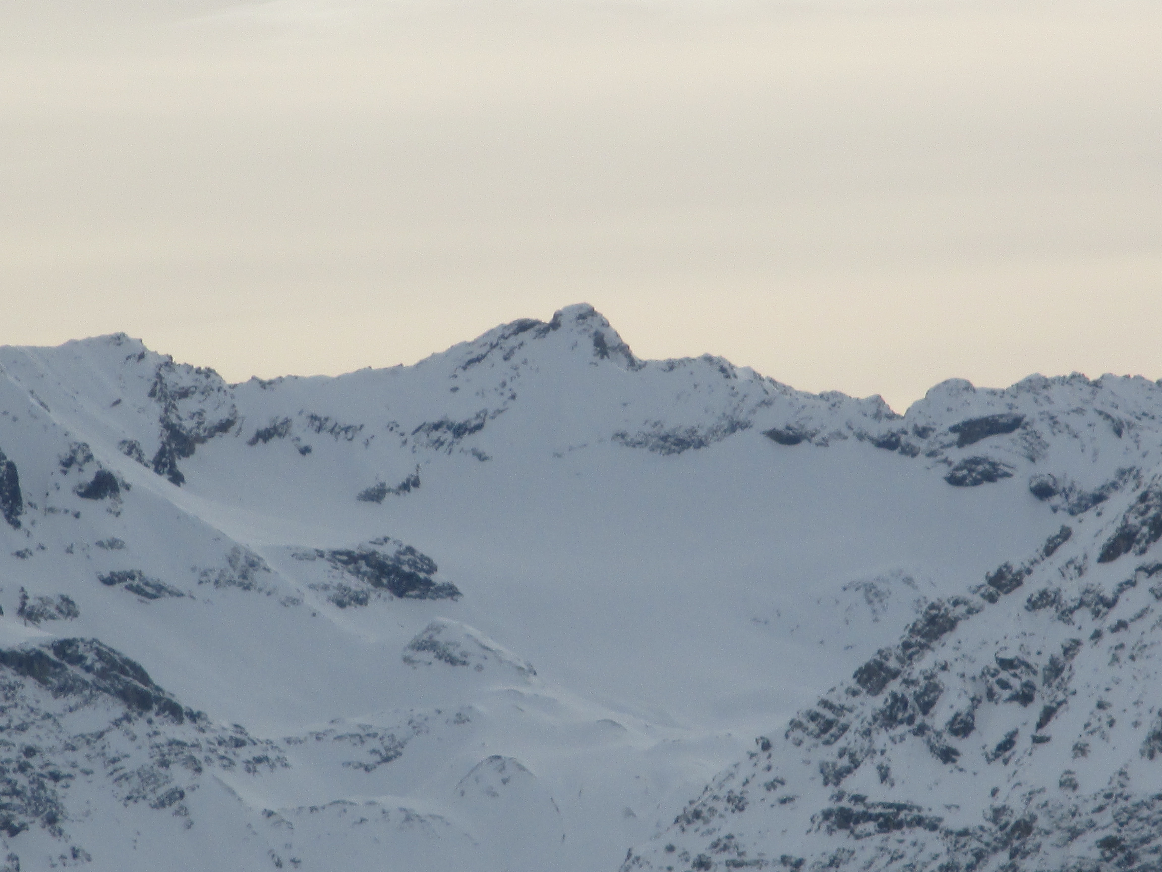 Gletscher Ducan, aufgenommen von Jakobshorn.